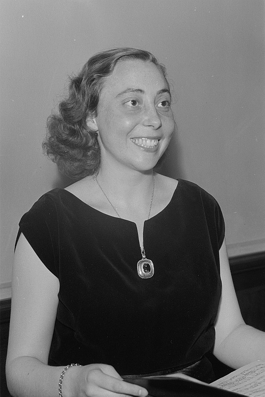 Original image description from the Deutsche FotothekAgnes Giebel (Sängerin)